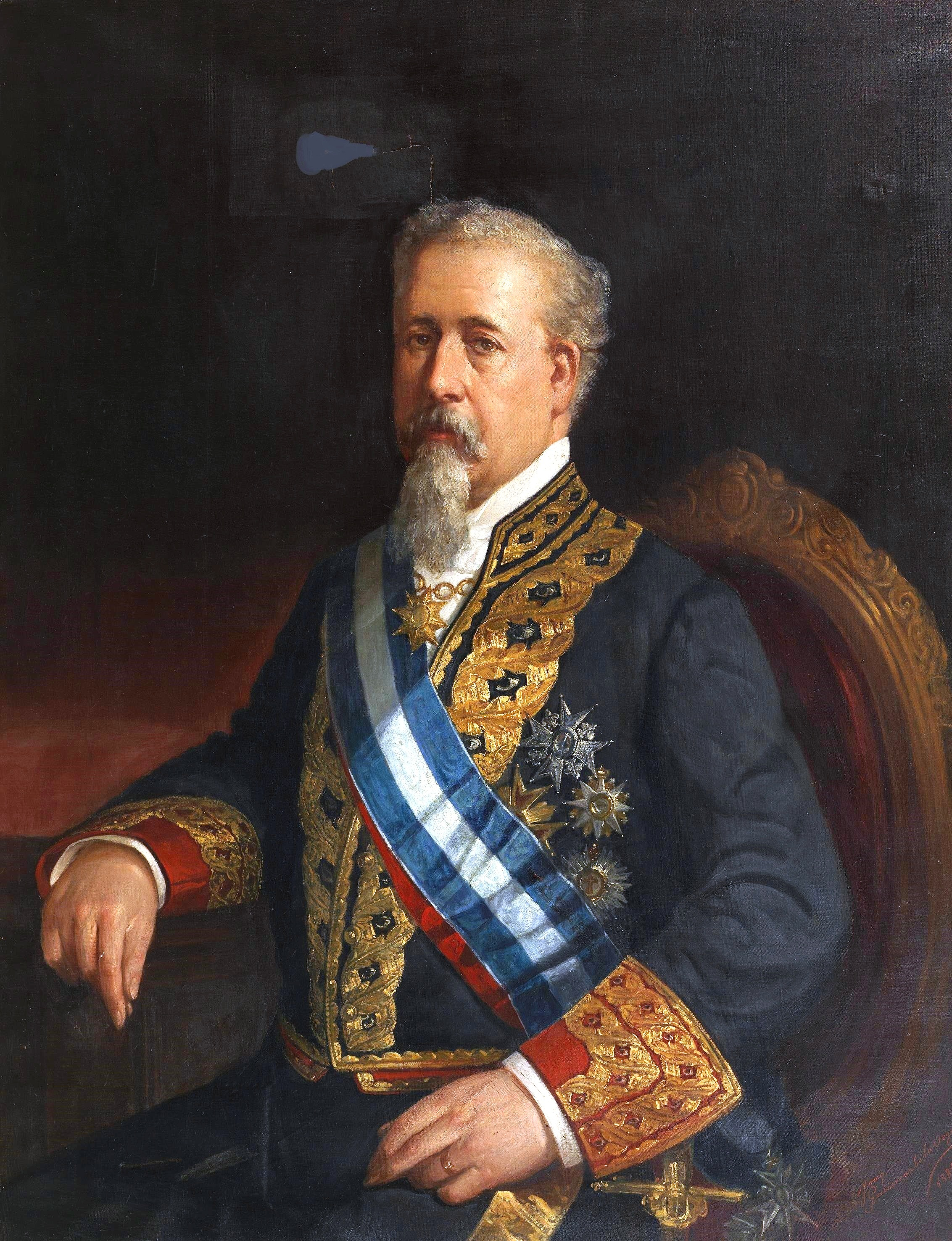 Retrato del político español Antonio Romero Ortiz (1822-1884), que llegó a ocupar diversas carteras ministeriales a lo largo de su vida y ejerció también el cargo de gobernador del Banco de España.